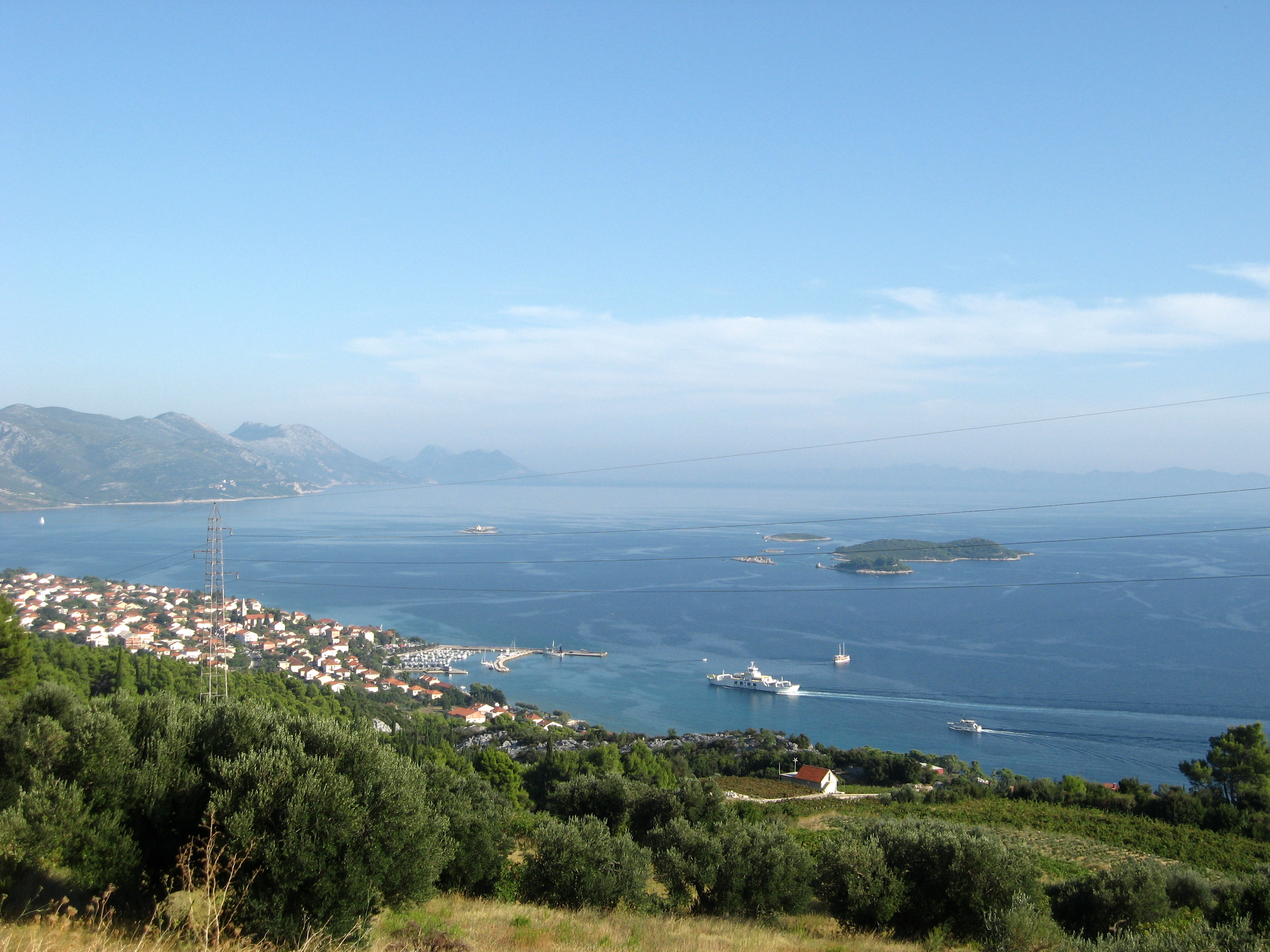 Orebić (Croatia)